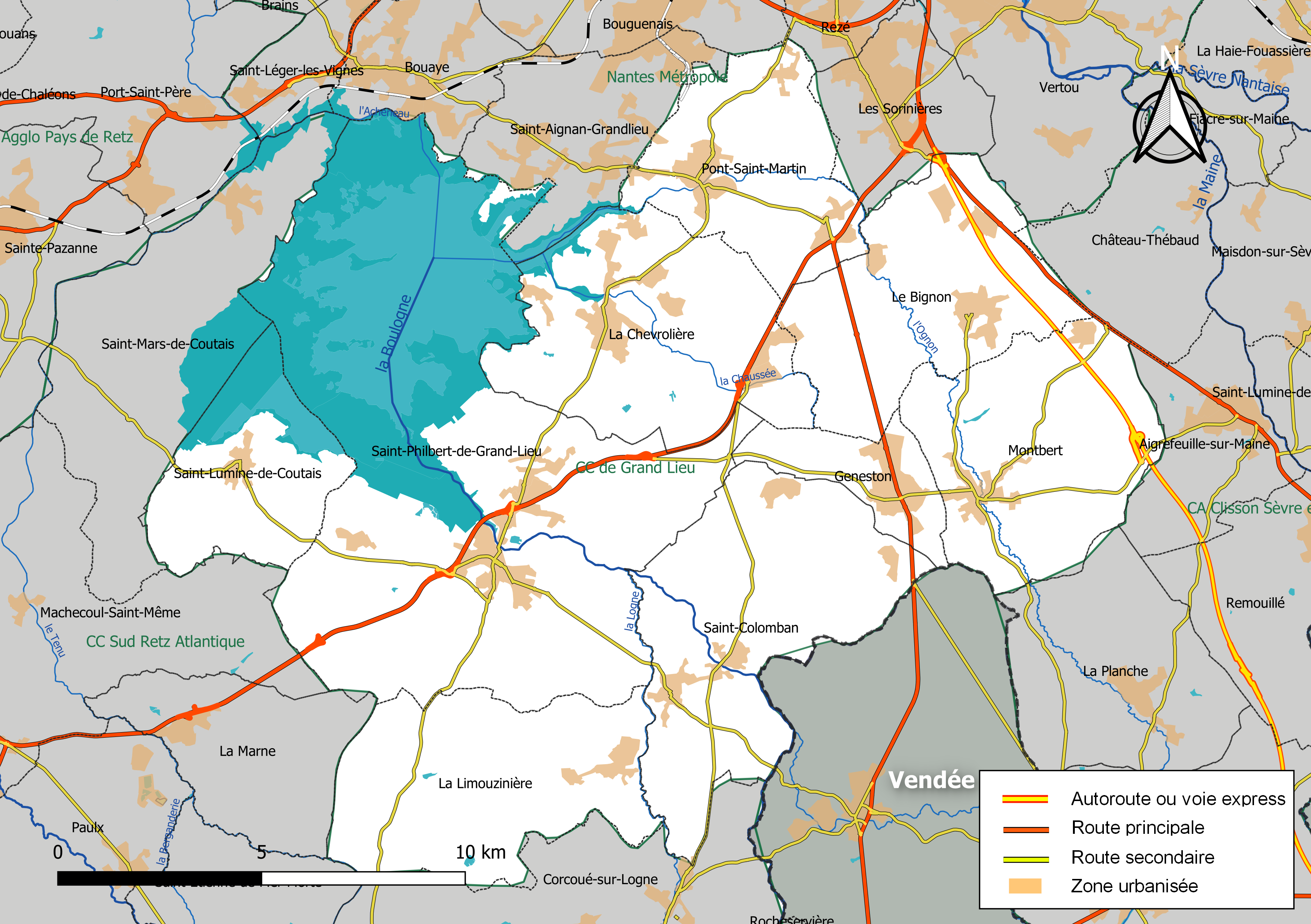 Carte géographique de la Communauté de communes de Grand Lieu, département de la Loire-Atlantique, France. Composition au 1er janvier 2019.